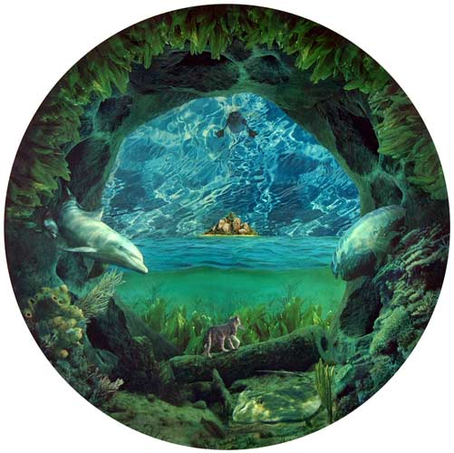 Philipp Heckmann, Maler, Die Insel der fischenden Katze, Collage, Ø 70cm